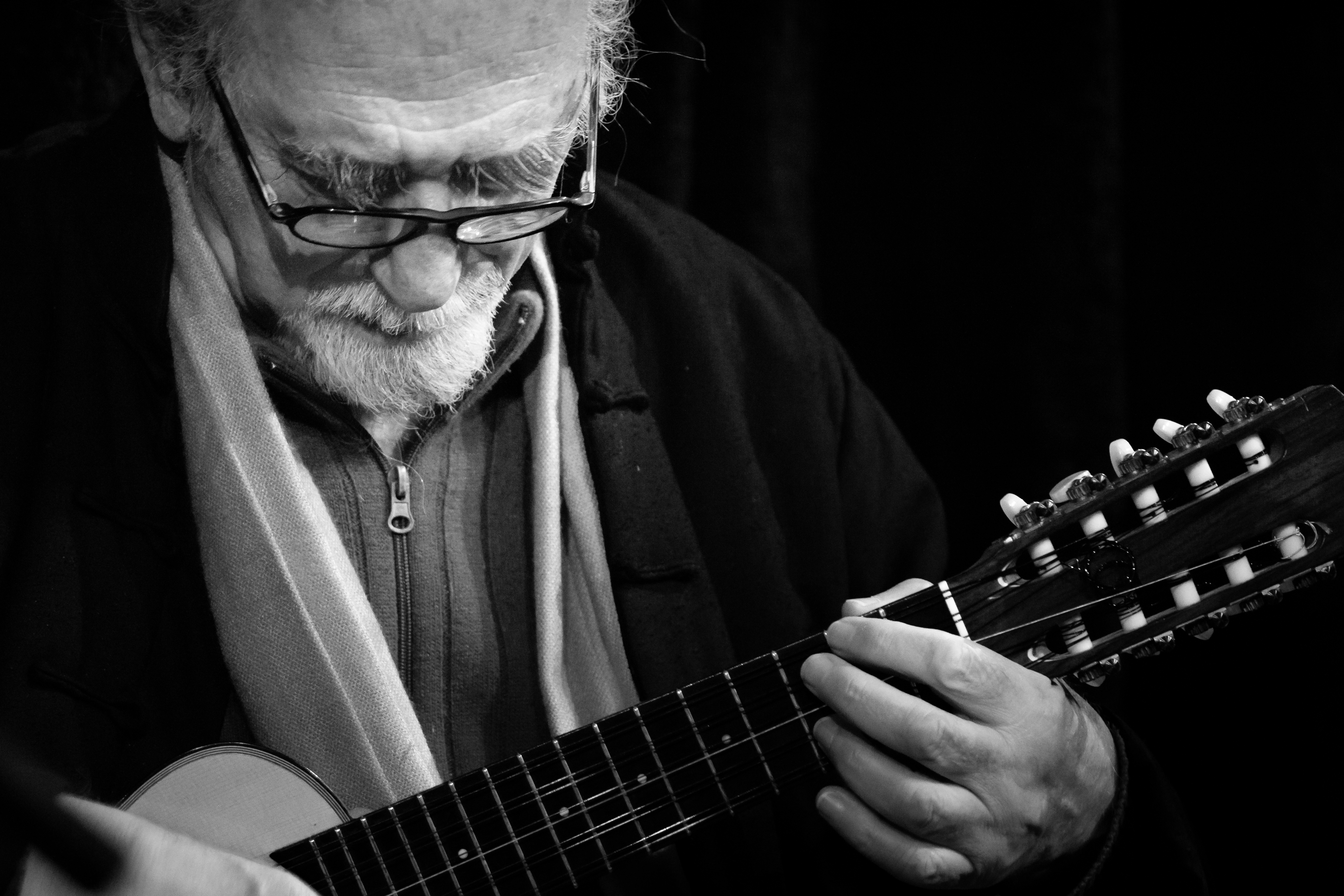 Jorge Milchberg durante una presentación del grupo Urubamba en Buenos Aires. 2 de Noviembre de 2014.